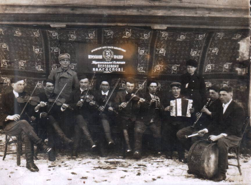 Перегонівські троїсті музики